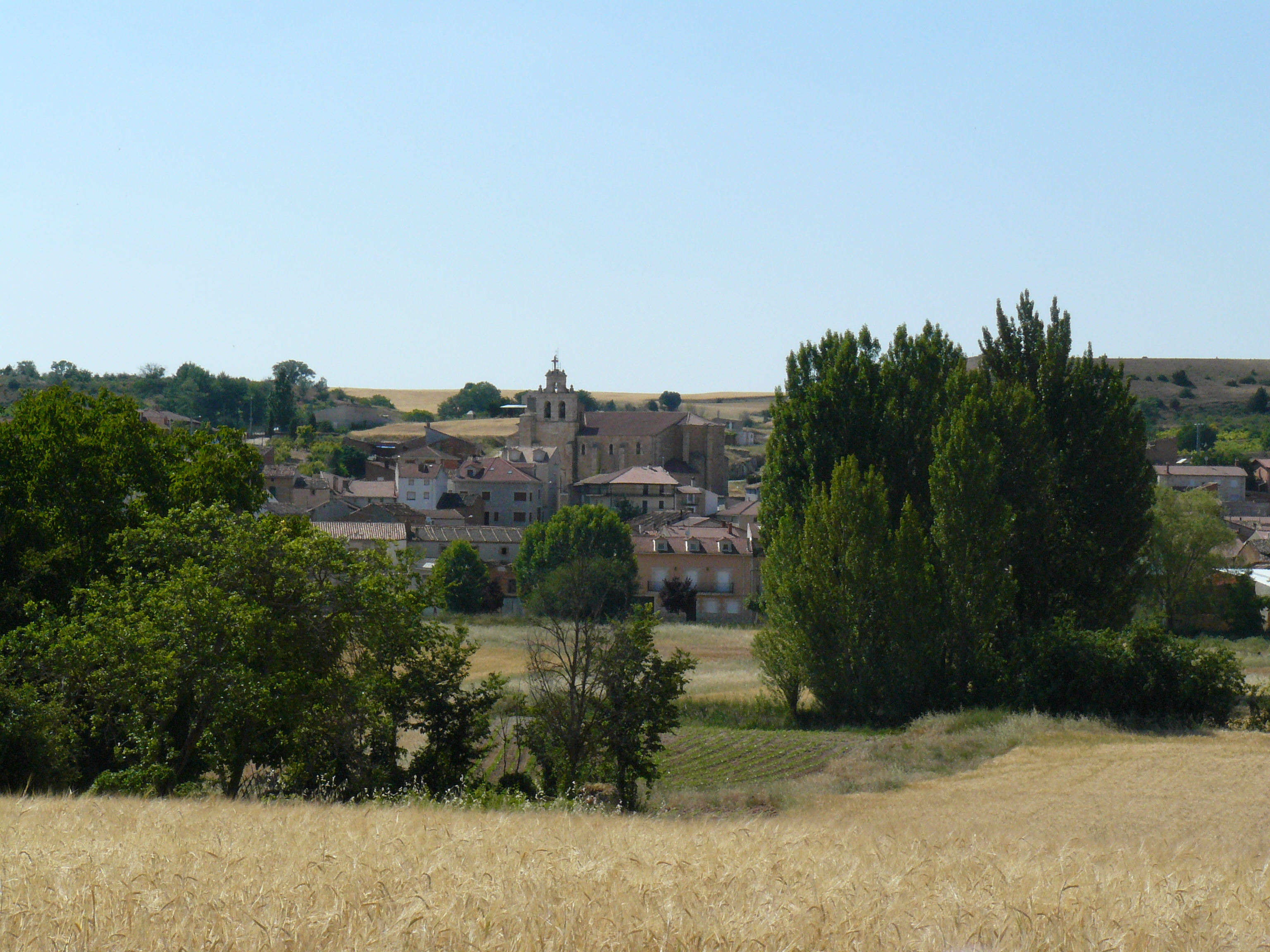 Hontoria de Valdearados, Burgos.